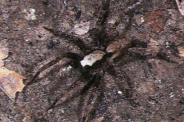 male Ctenus yaeyamensis from Okinawa.